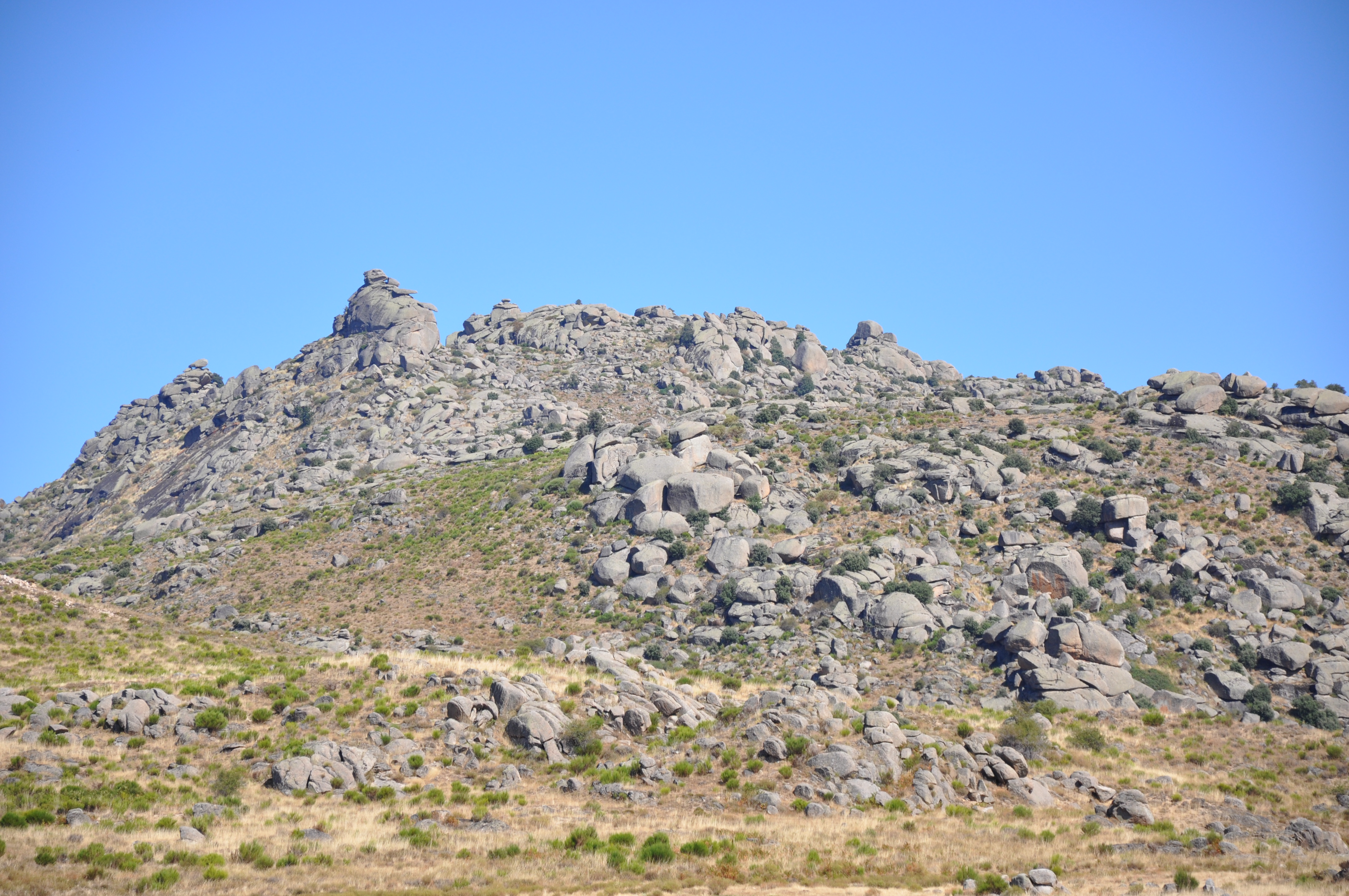 Sierra de la Paramera, Berrocal Gordo, La Hija de Dios (Ávila), España.